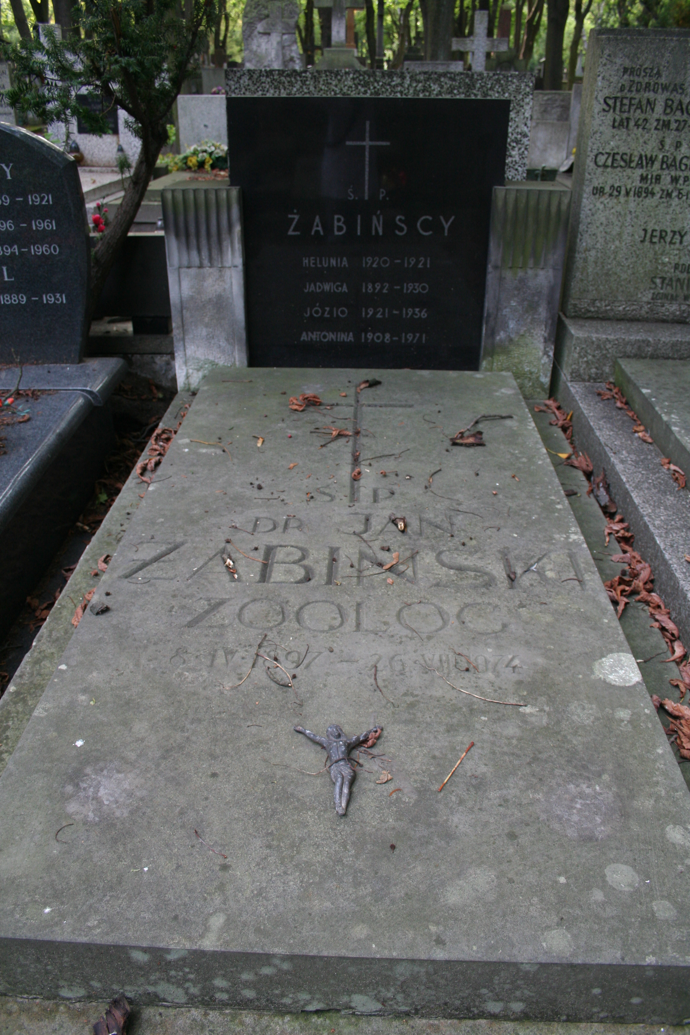 Grób Jana Żabińskiego i Antoniny Żabińskiej na warszawskim Cmentarzu Powązkowskim